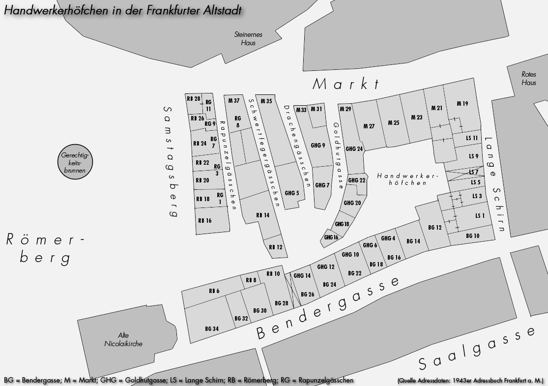 Bausituation am Fünffingerplätzchen bzw. Handwerkerhöfchen in der Altstadt von Frankfurt von Main nach der Auskernung 1938. Selber gezeichnet, GFDL-Lizenz.